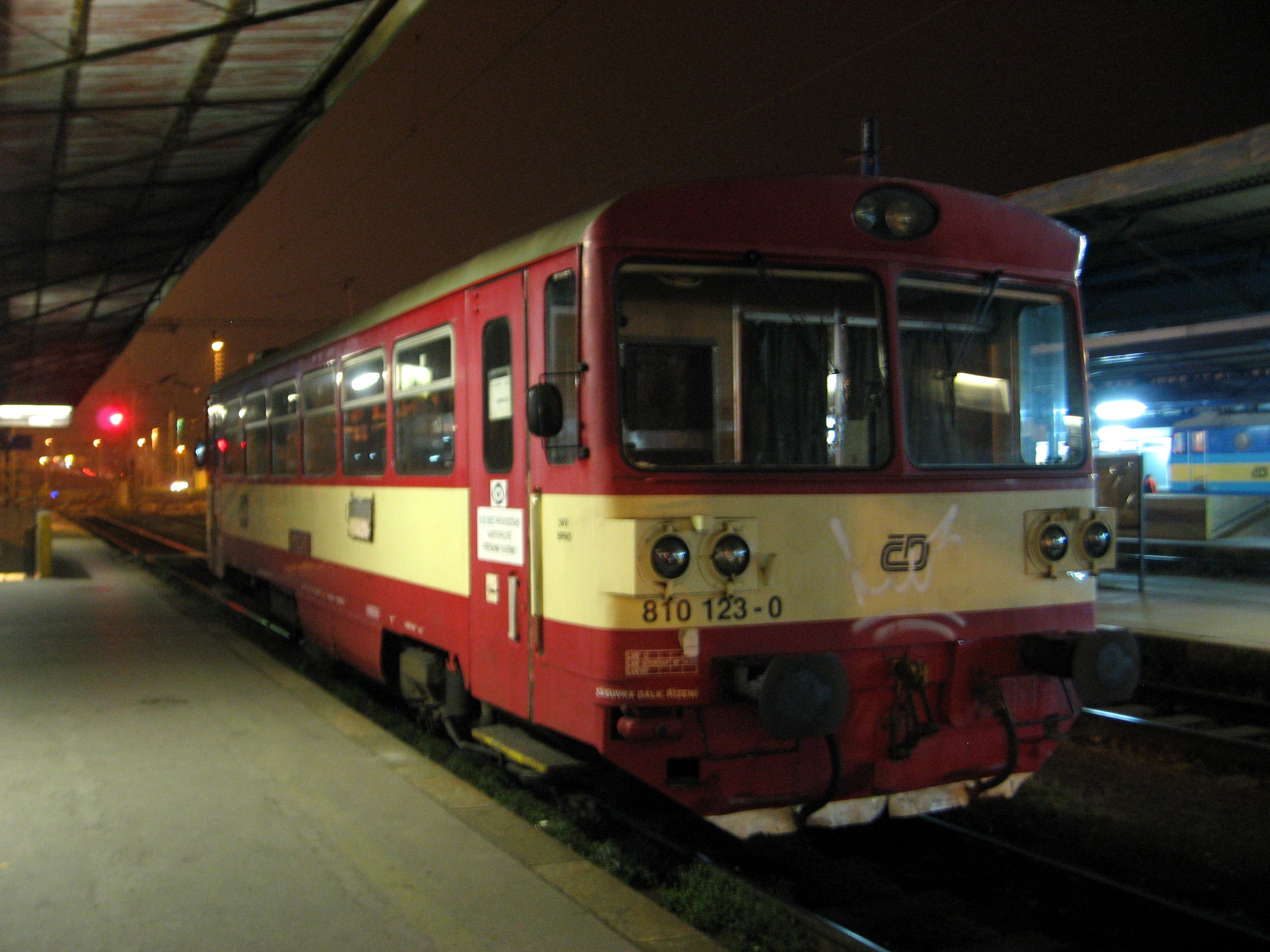 Osobní vlak na nádraží v Havlíčkově Brodě, který pojede do Humpolce